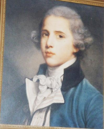 Charles Athanase Walckenaer (1771-1852) by Jean-Baptiste Greuze, French civil servant and scientist.